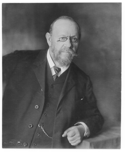 Porträt von Friedrich Gottlieb Stebler